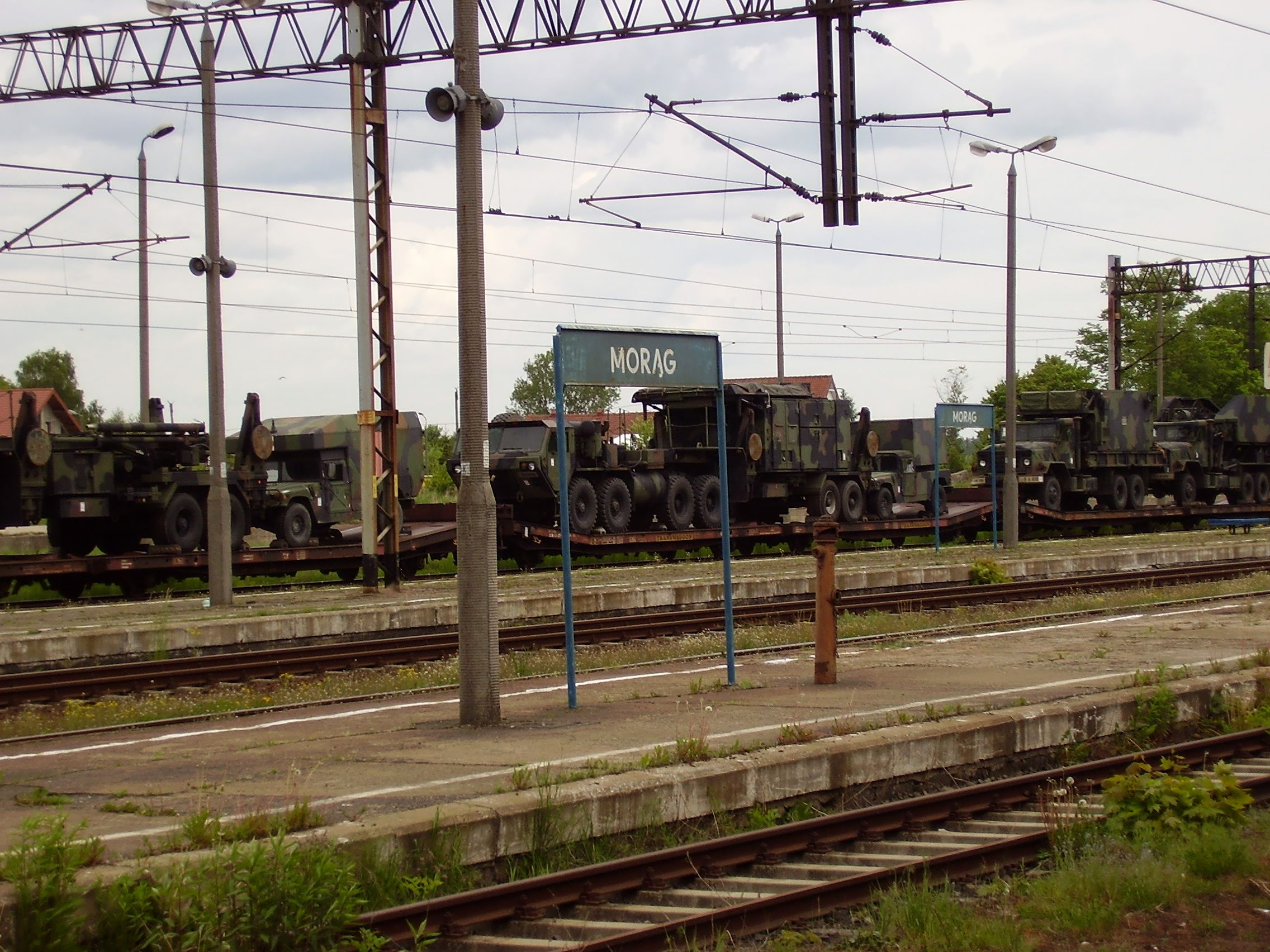 Bateria patriot na stacji w Morągu